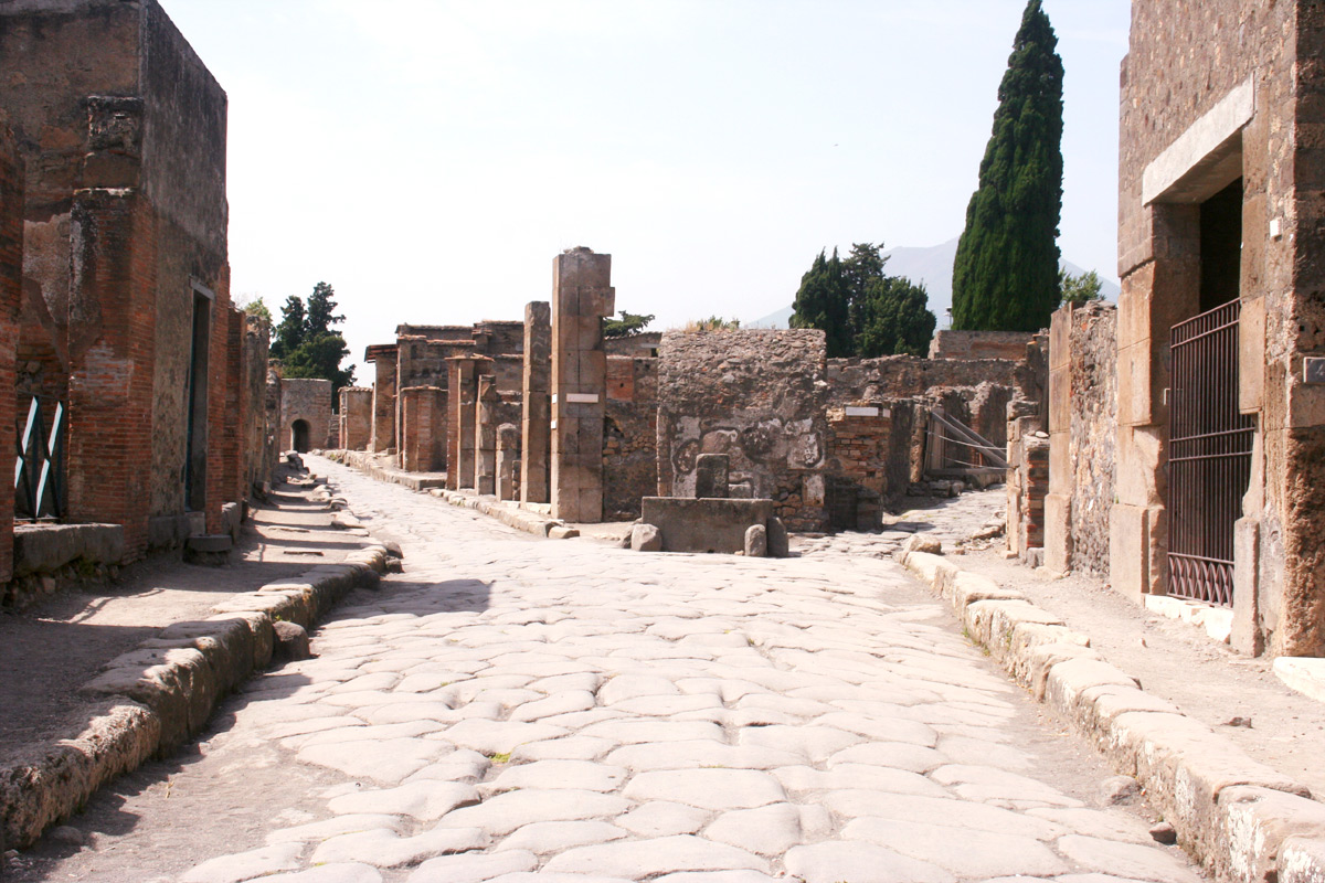 Pompeii Street